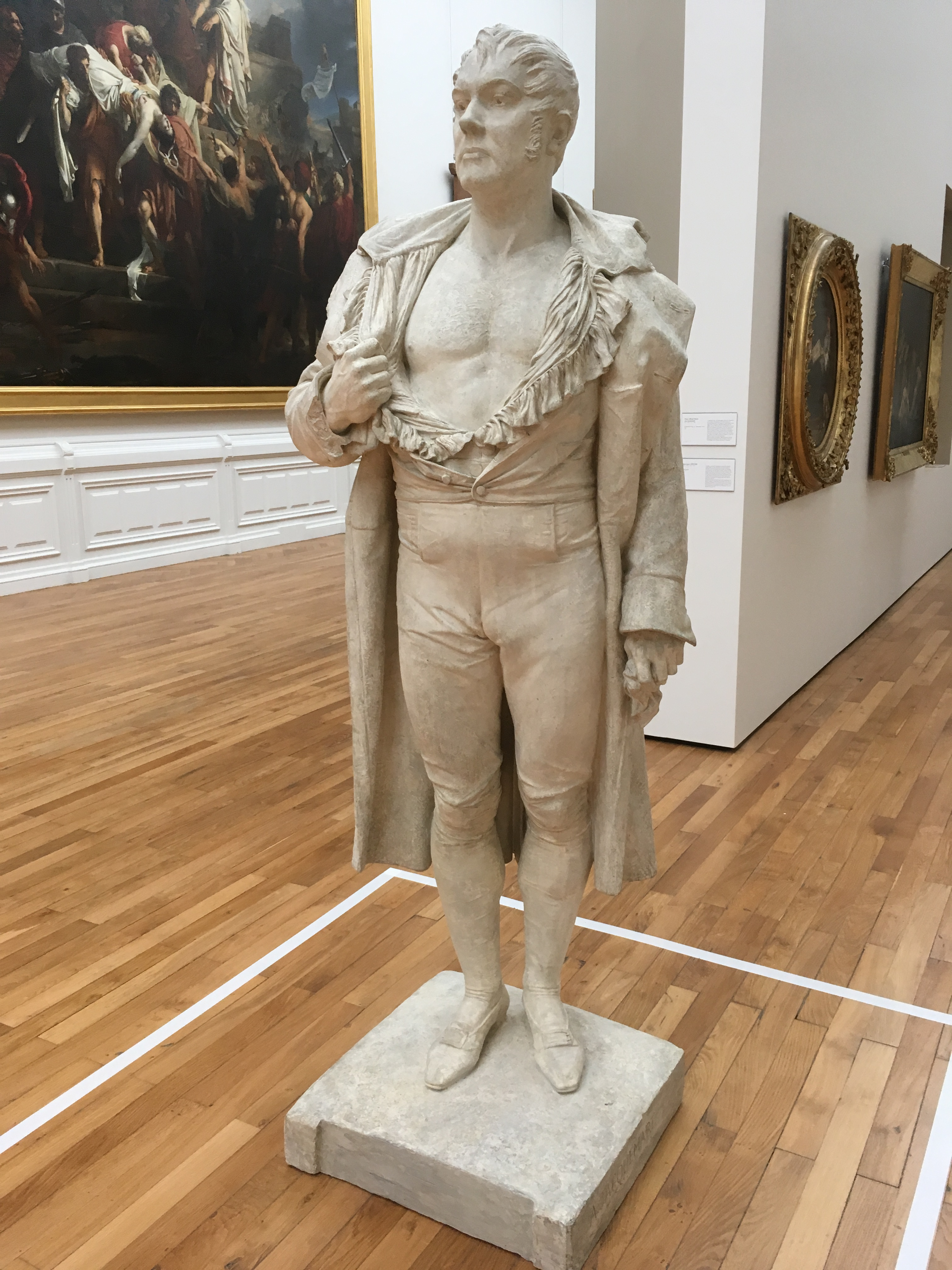 Henri-Alfred Jacquemart, Le maréchal Ney le 7 décembre 1815, plâtre, Nantes, musée des Beaux-Arts